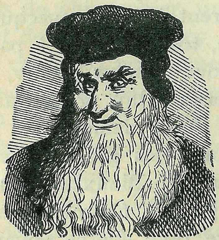 Monseigneur Sardini (Scipion Sardini), gravure de Jacques Adrien Lavieille d'après un dessin de Gustave Doré.